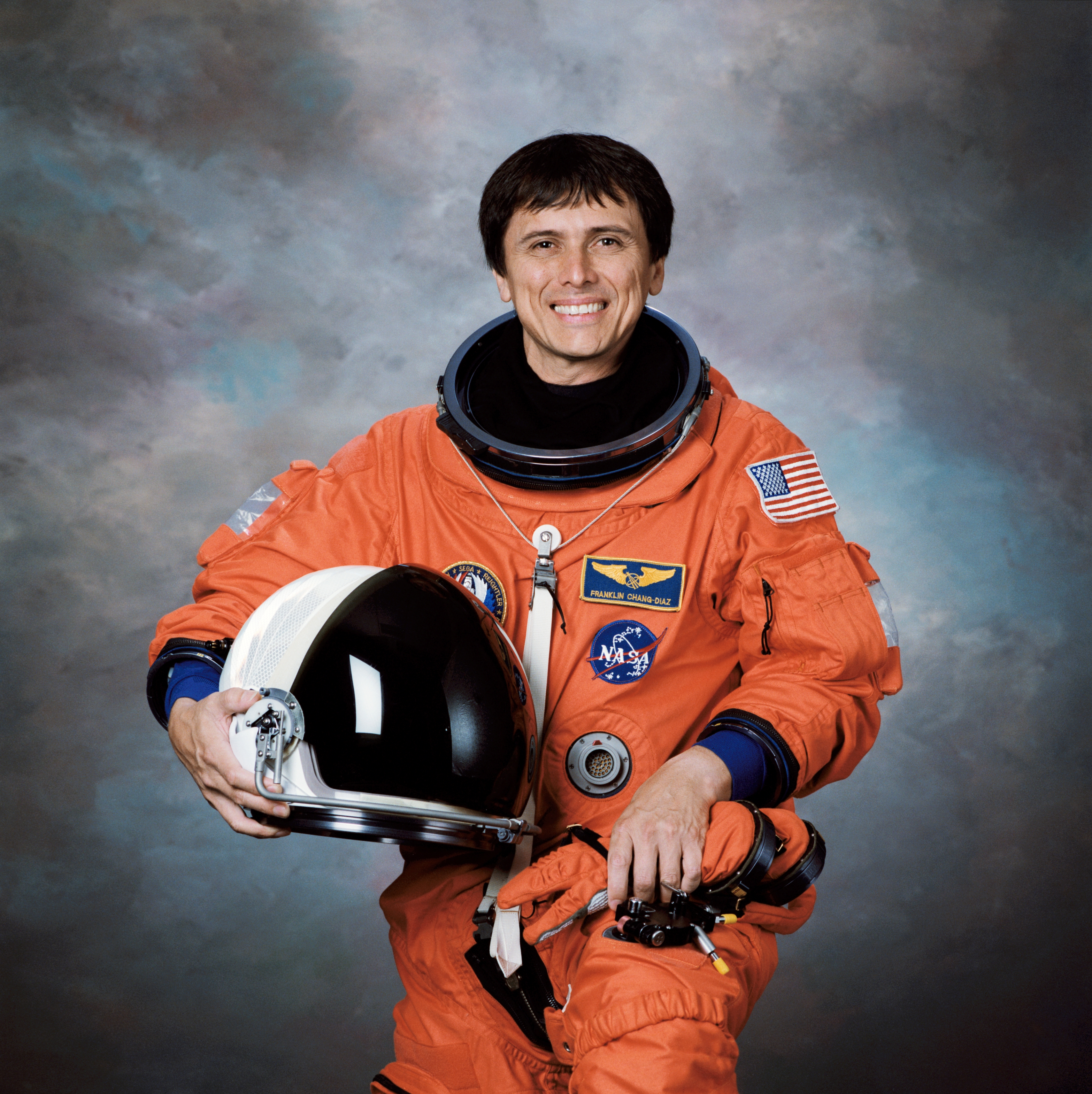 Franklin Ramon Chang-Diaz (US Astronaut)